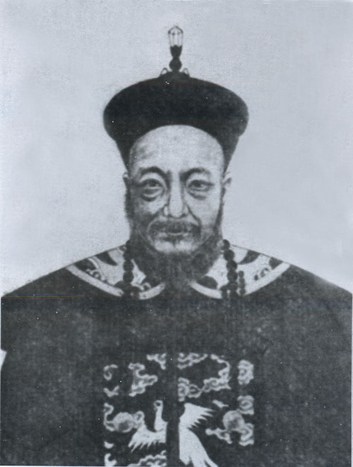 王祖畬（1842年－1918年），字岁三，一字紫翔，晚清进士、官員，江苏太仓人。